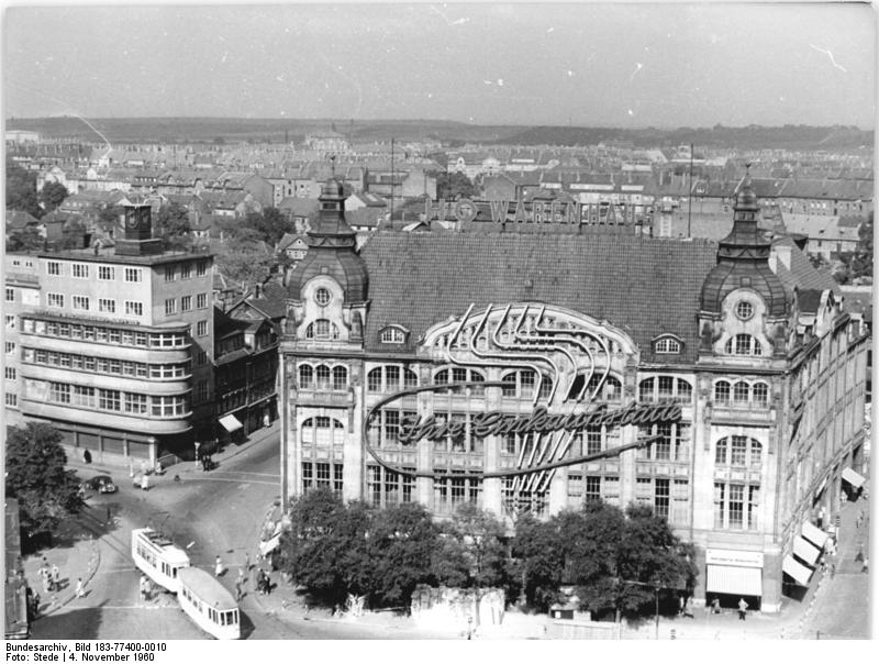 Erfurt, HO-Warenhaus Zentralbild Stede Me-Fr. 4.11.1960 Erfurt (Thüringen) Blick auf das HO-Warenhaus der Bezirkshauptstadt.